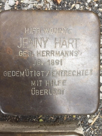 Stolpersteine